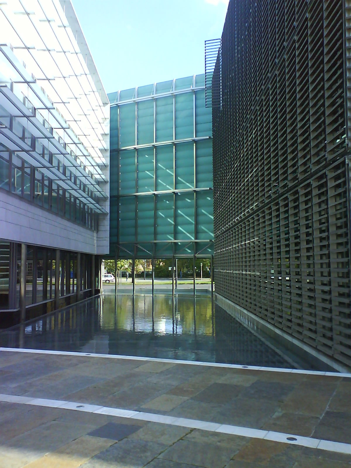 Nordische Botschaften Berlin